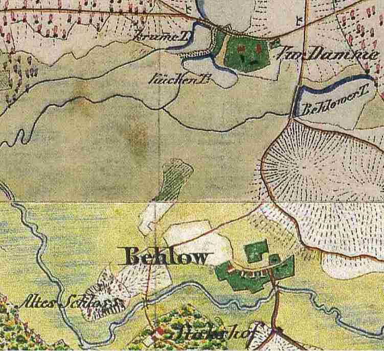 Behlow, Gemeindeteil der Stadt Lieberose, Lkr. Dahme-Spreewald, Brandenburg, Deutschland, Ausschnitt aus den Urmesstischblättern Trebatsch 3951 und 4051 Lieberose (kombiniert)